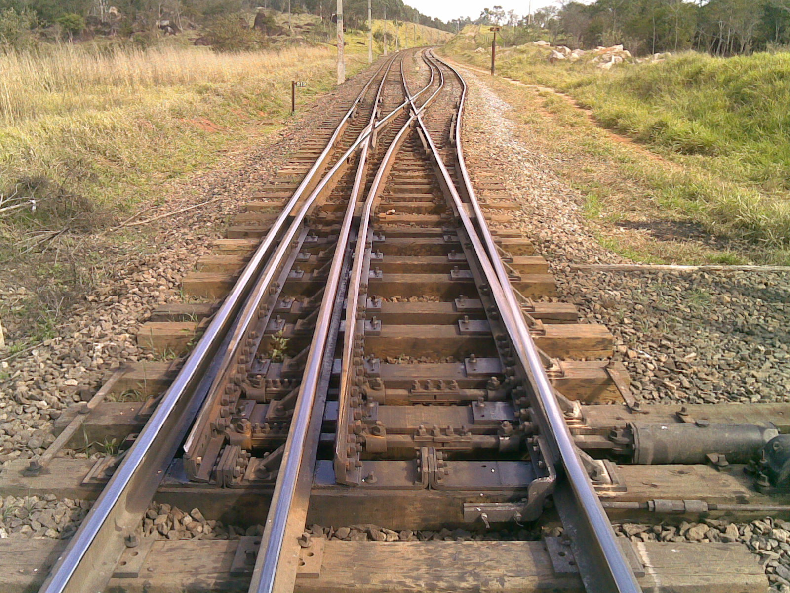 Início do pátio da estação ferroviária de Salto - Variante Boa Vista-Guaianã km 212